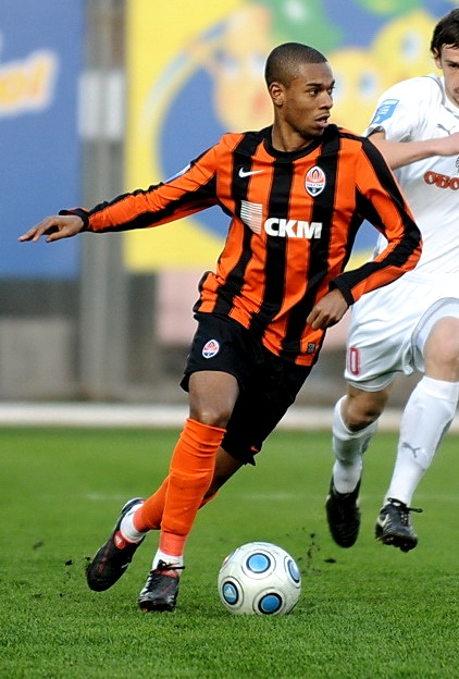 В Матче против ФК Оболонь